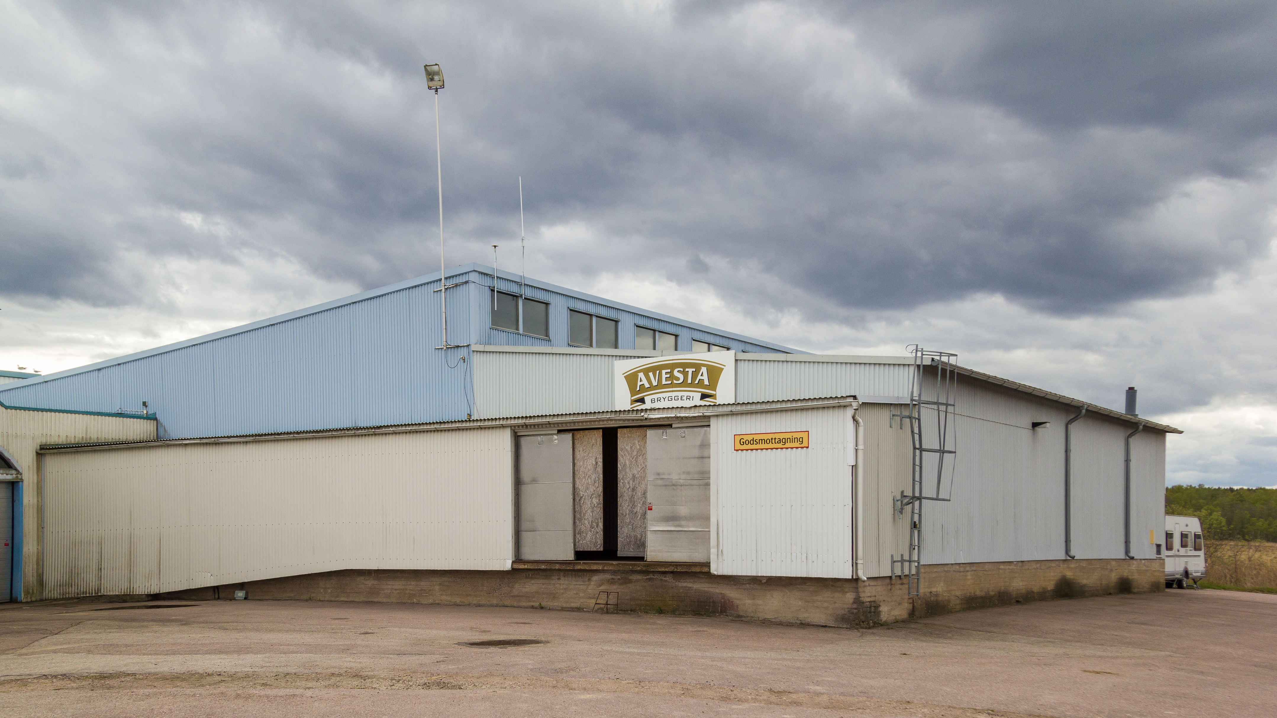 F.d. Avesta Bryggeri (Fors Nya Bryggeri) i Fors, Avesta kommun, Dalarnas län, Sverige.